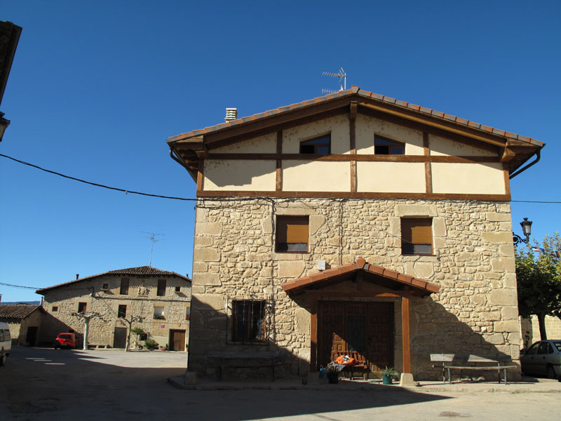 Calle del pueblo de Suzana (Miranda de Ebro, España)